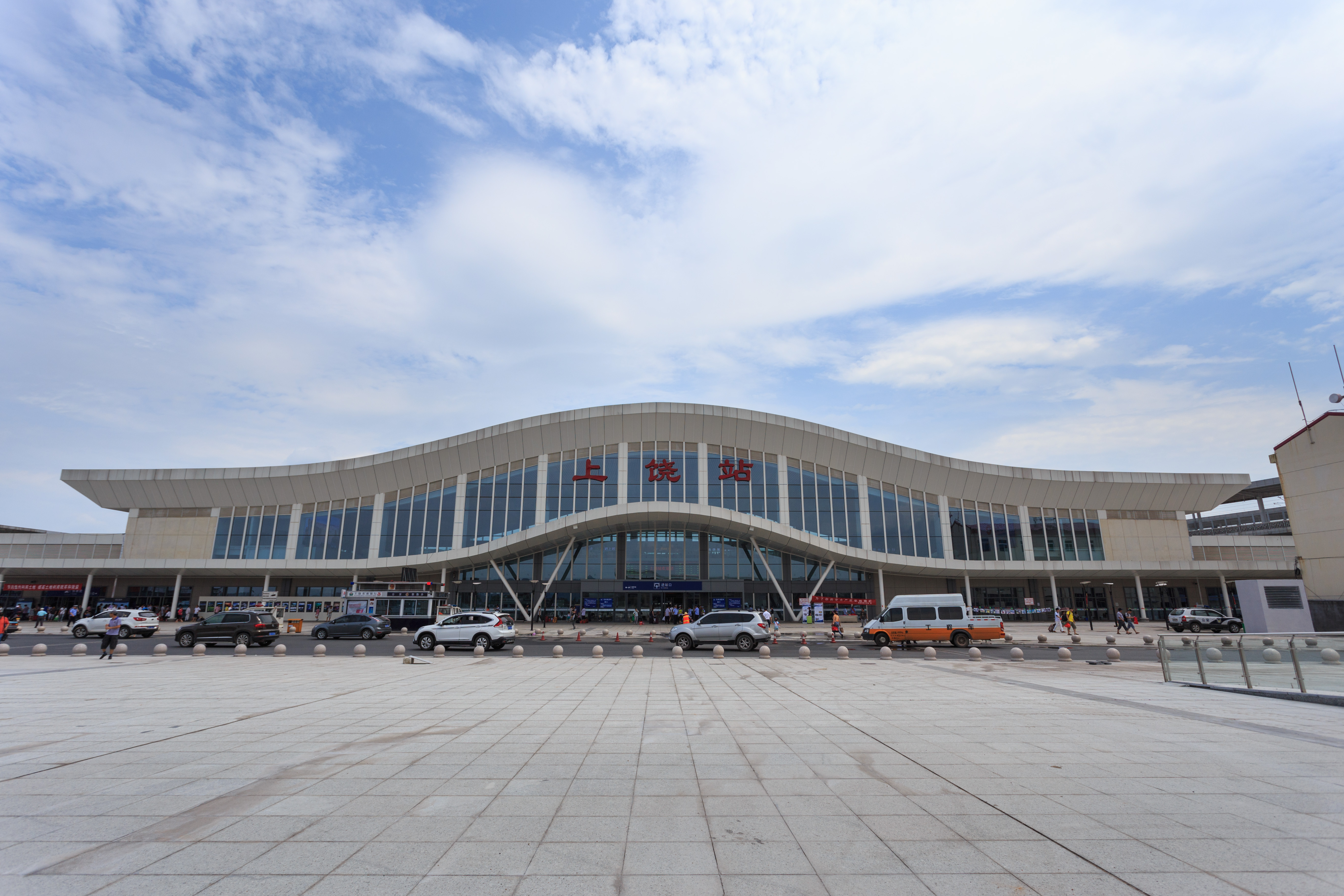 上饶火车站 新站房